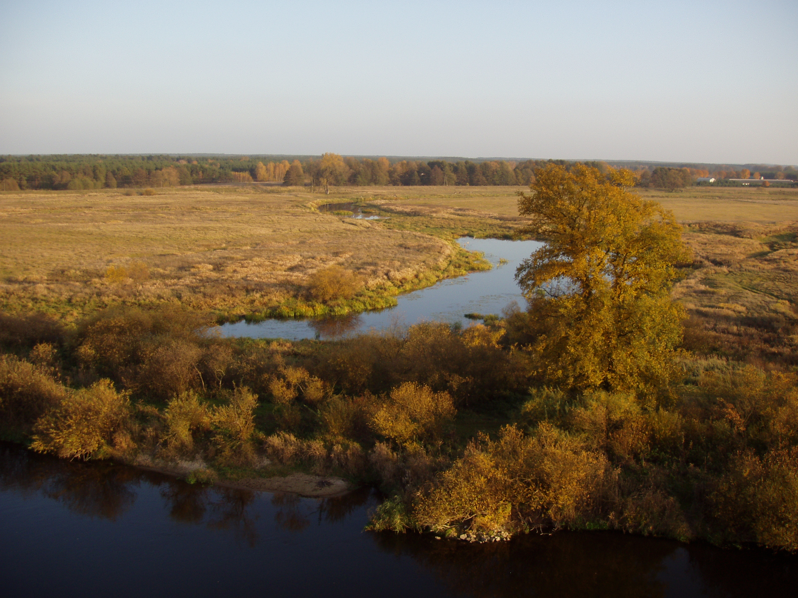 Rezerwat Przyrody Santockie Zakole